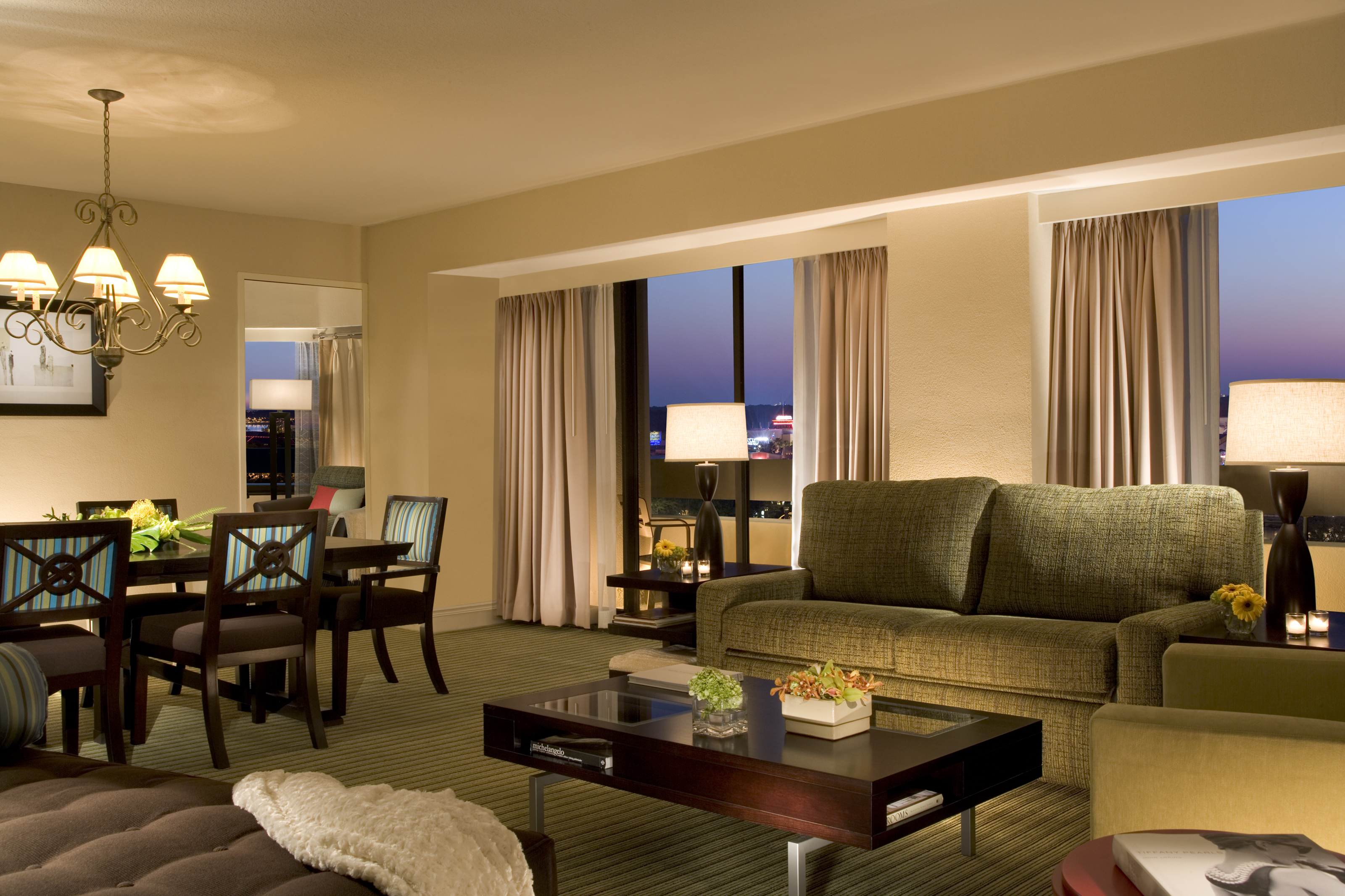 Suite at Hilton WDWR